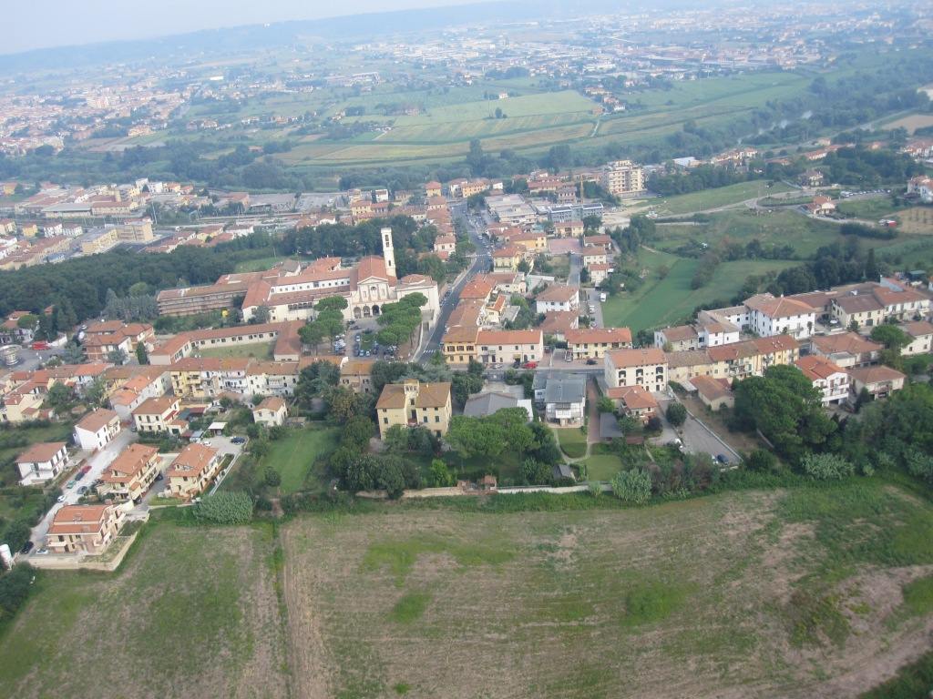 San Romano